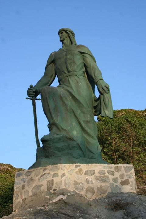 Estatua de Abderraman I en Almuñecar, en homenaje a su llegada a tierras andaluzas